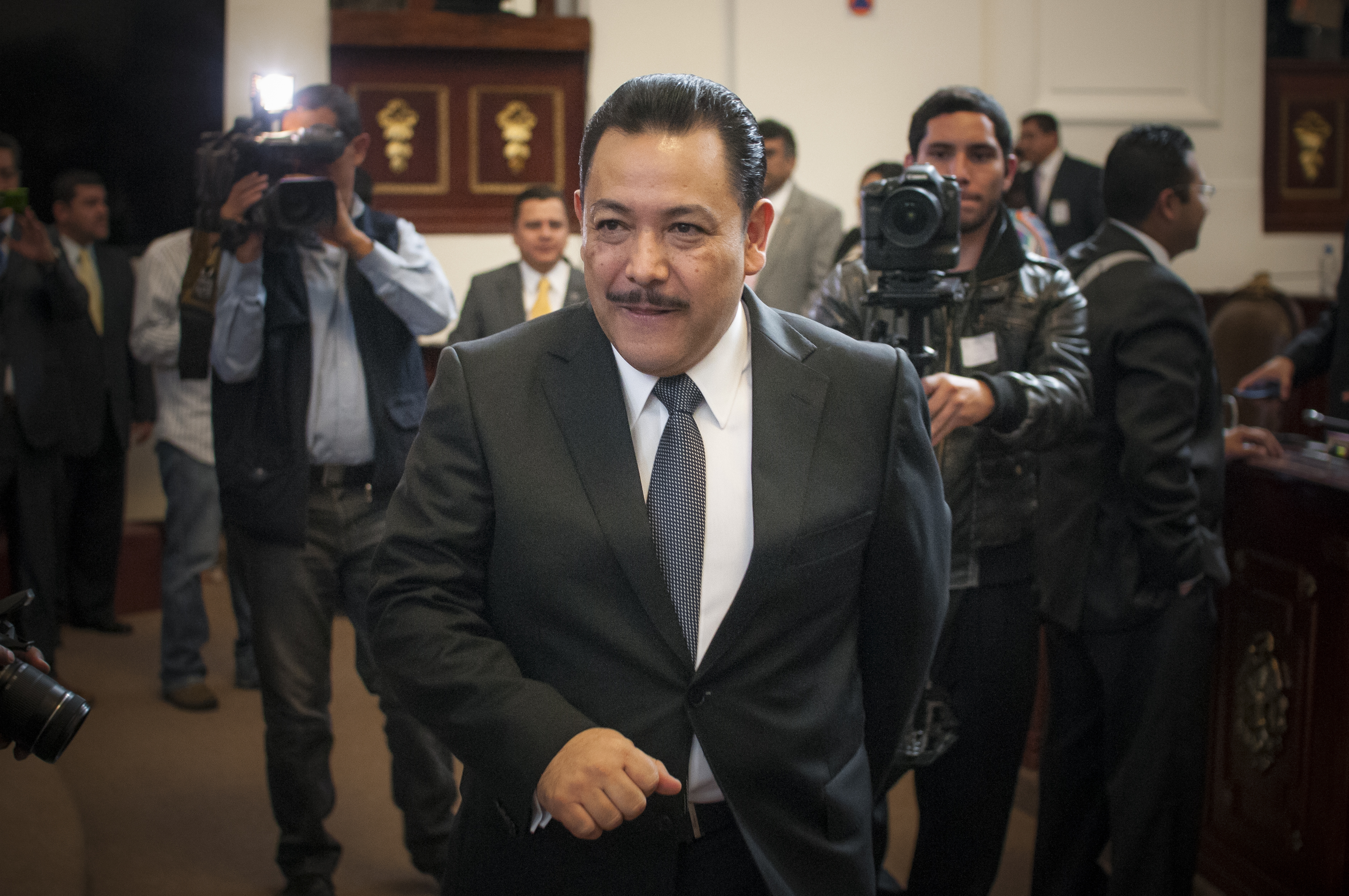 Héctor Serrano Cortés es un político mexicano ligado al gobierno del Distrito Federal.